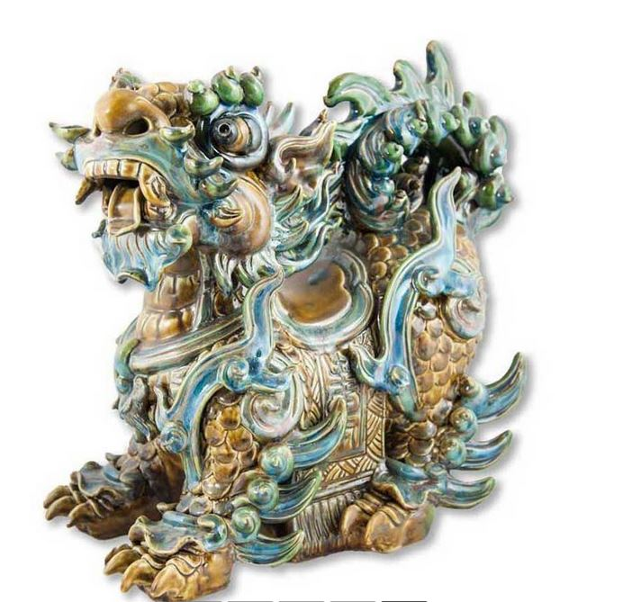 kích thước nhỏ nên thích hợp đặt tại không gian nhỏ hẹp. Hình dáng nghê hùng dũng, uy nghi